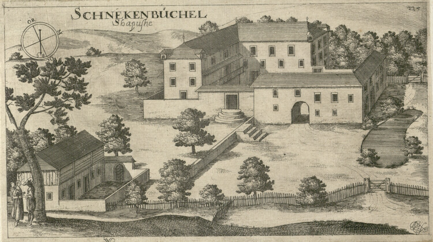 Dvorec Zapuže